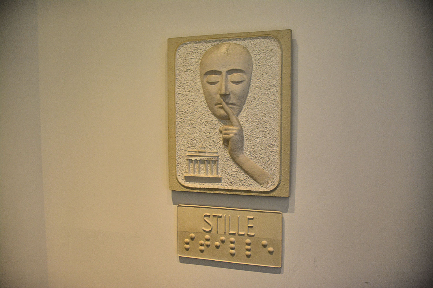 Pokój ciszy przy Bramie Brandenburskiej